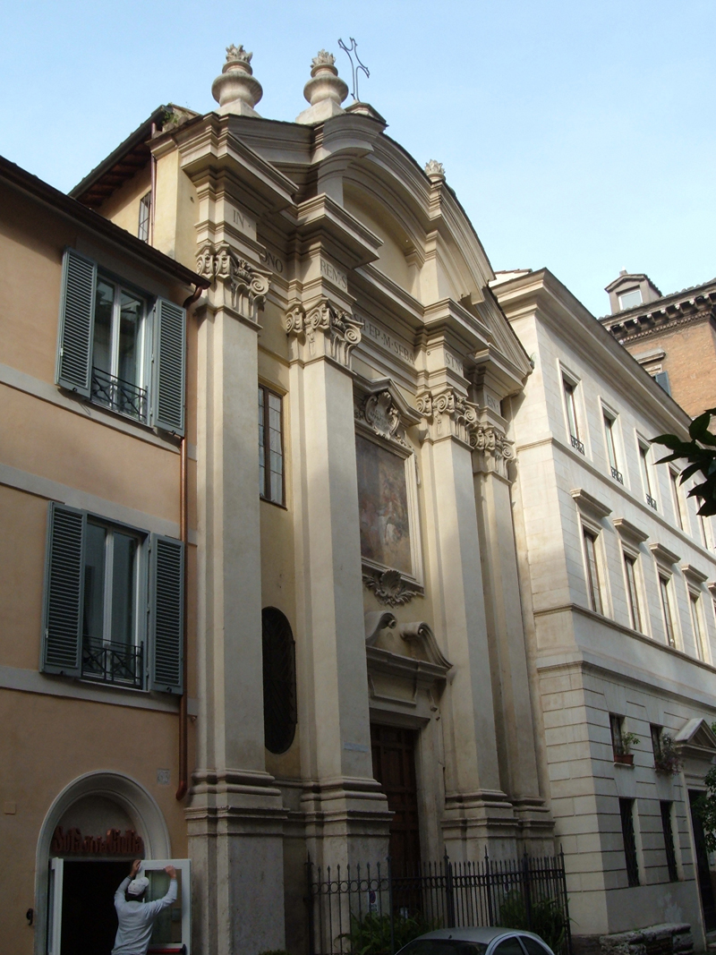 San Biagio degli Armeni, chiesa di ROma nel rione Ponte. Chiesa nazionale degli Armeni. Foto scattata da me nel 2005.